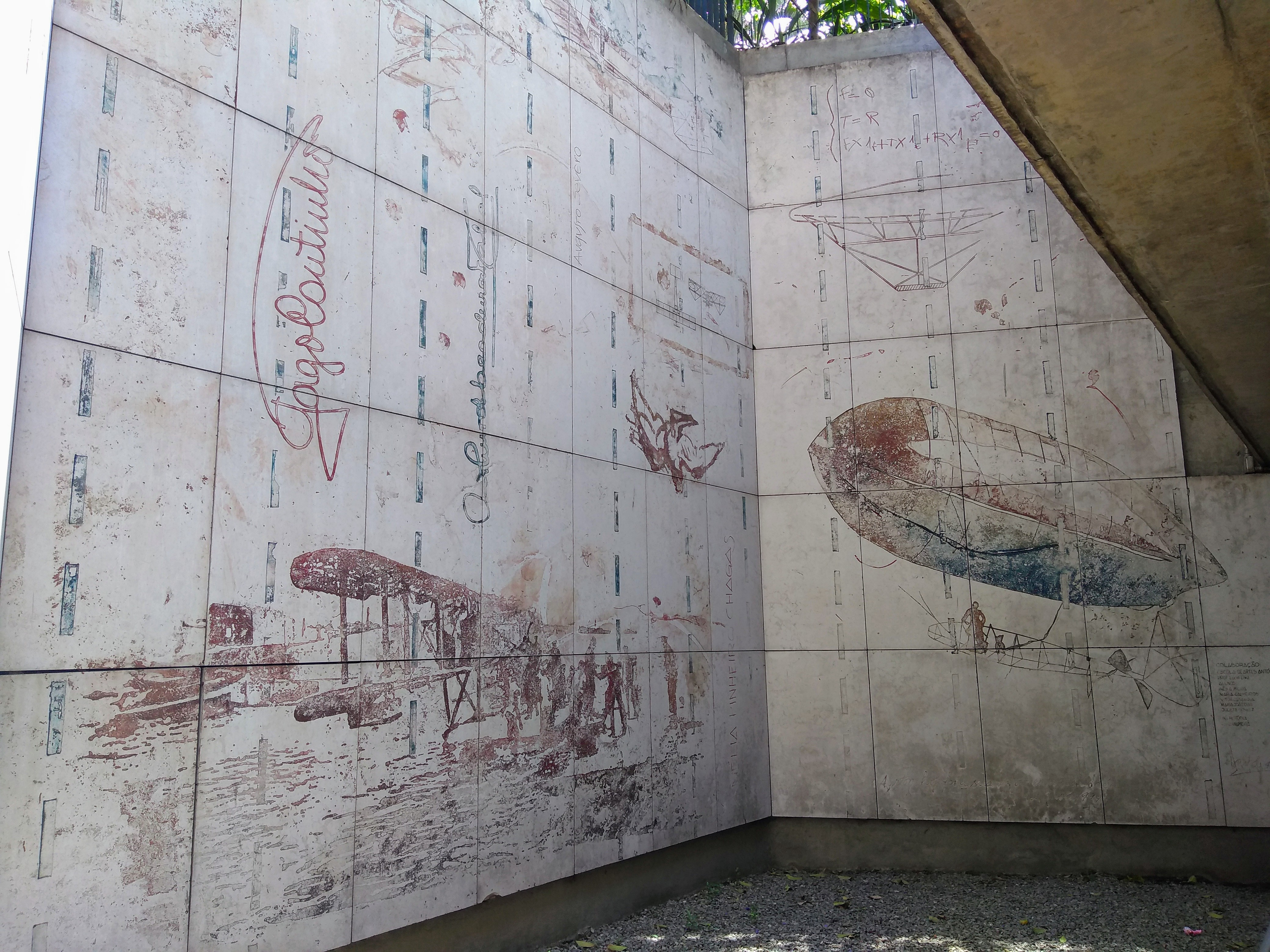 “As Vias do Céu”, de David de Almeida A obra “As vias do céu”, 1994, - do pintor, gravador e escultor português David de Almeida (1945 – 2014) – pertence à uma coleção da Companhia do Metropolitano de São Paulo, o “Metrô”, chamada “Arte no Metrô”, e está localizado na Estação Conceição, linha azul do metrô paulistano. O painel tríptico realizado com a técnica mista de pedra gravada a ácido e pintura com tinta automotiva chegou ao Brasil por meio de um intercâmbio cultural entre o Metrô de São Paulo e o Metrô de Lisboa. Poucos metros ao lado da produção “As Vias do Céu”, se encontra outro feito de David de Almeida: “As vias da Água”, também cedida pela companhia metropolitana portuguesa. Em troca, a instituição brasileira concedeu “A Chegança”, de Luiz Ventura, instalada na Estação Restauradores. Em entrevista concedida ao metrô brasileiro, o artista descreveu a intenção com que realizou as obras: “esses dois trípticos pretendem ser uma homenagem aos desbravadores das Águas e dos Céus de ambos os países. Santos Dumont – que bem poderia ser uma figura do Renascimento-, Gago Coutinho e Sacadura Cabral (e uma breve referência a Ayrton Senna, que cumpriu o Céu no momento em que o autor procedia aos primeiros esboços) e ainda o inevitável Pedro Álvares Cabral são algumas das personagens que habitam essas obras”. As fotos buscam captar os mínimos detalhes em diversos ângulos do painel tríptico “As Vias do Céu”, afim de elucidar a homenagem de David de Almeida a figuras extremamente importantes e inovadoras tanto do Brasil quanto de Portugal.